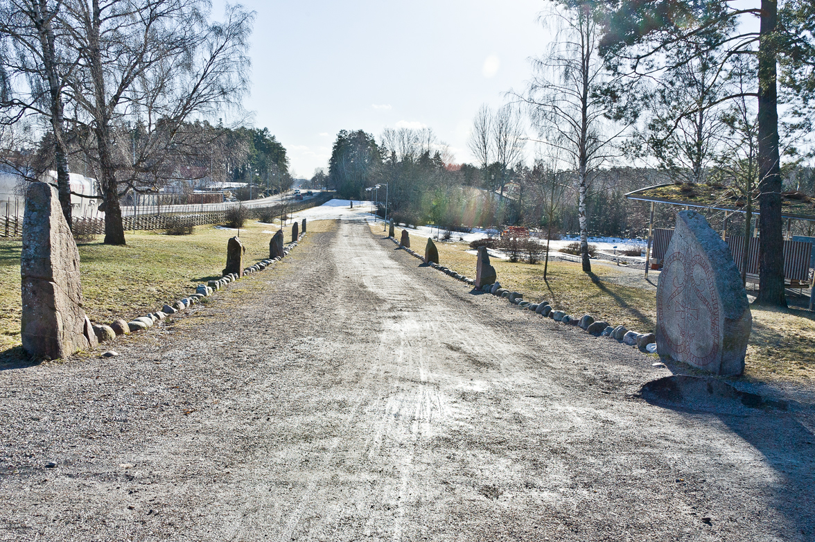 Storbonden Jarlabankes bro i Täby kyrkby. Ursprungligen från ca 1050 efter Kristus.